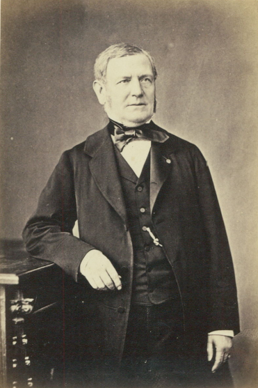 Baron Alfred Renouard de Bussière (1804-1887)